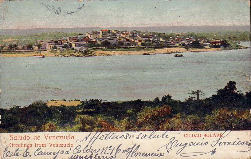 Ciudad Bolívar, estado Bolivar - Venezuela c.1912